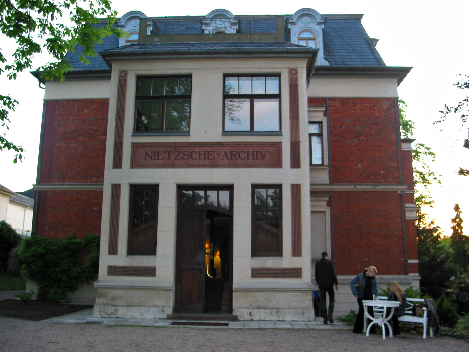 Ostansicht des ehem. Nietzsche-Archiv in der Villa Silberblick. Friedrich Nietzsche verbrachte 1897-1900 die letzten Jahre seines Lebens in diesem Haus. Von 1896-1945 war es Sitz des Nietzsche-Archivs. Das Erdgeschoss wurde 1902-1903 von Henry van de Velde als Arbeits- und Gedenkstätte gestaltet.